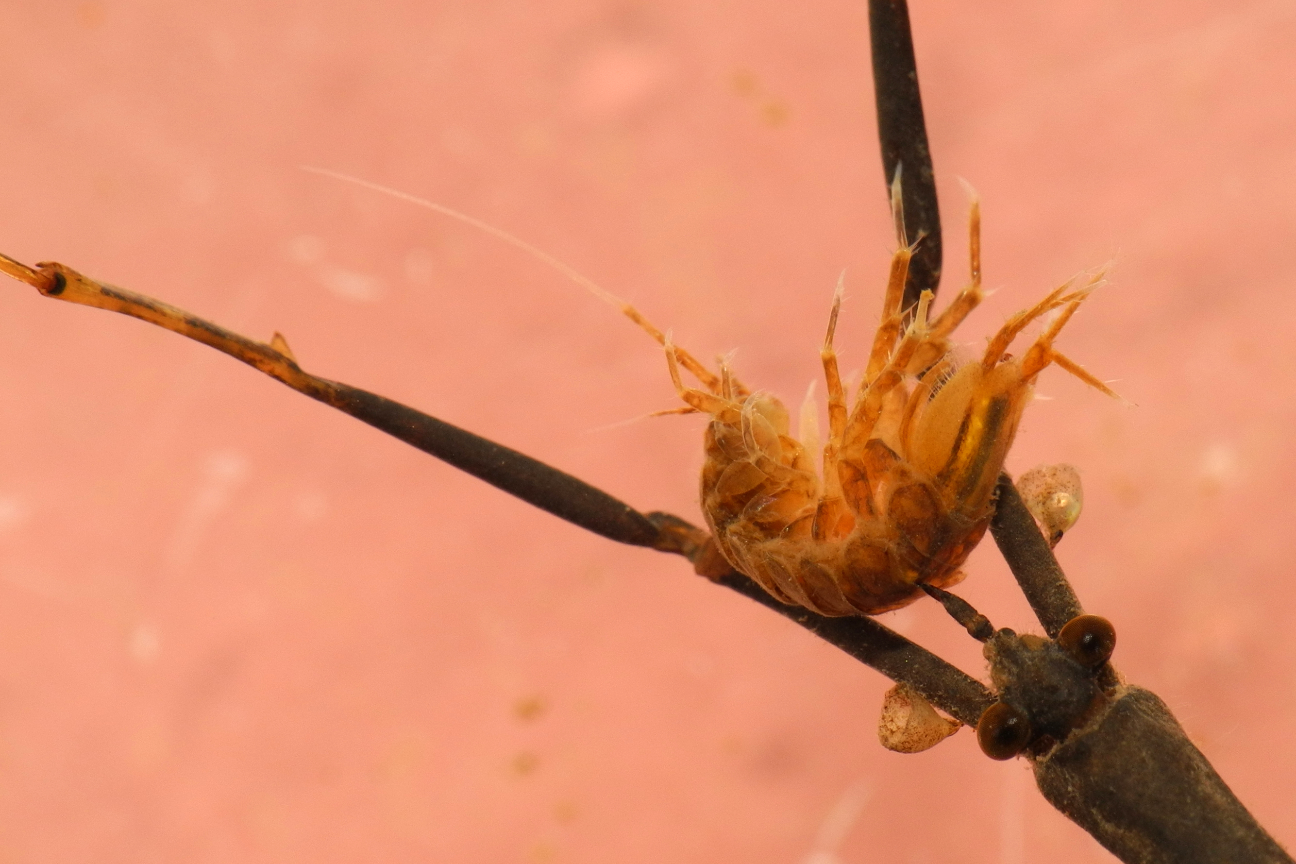 Ranatre (Ranatra sp.) mangeant une aselle (Asellus aquaticus). Image prise avec la bonnette Raynox DCR-250.